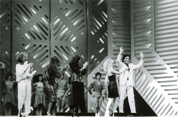 Alex Damiani premiato al Festival di Viña del Mar. Tratto dal sito (sito ufficiale del cantante e attore). Autorizzazione fornita direttamente dall'interessato. OTRS 2007050110001475